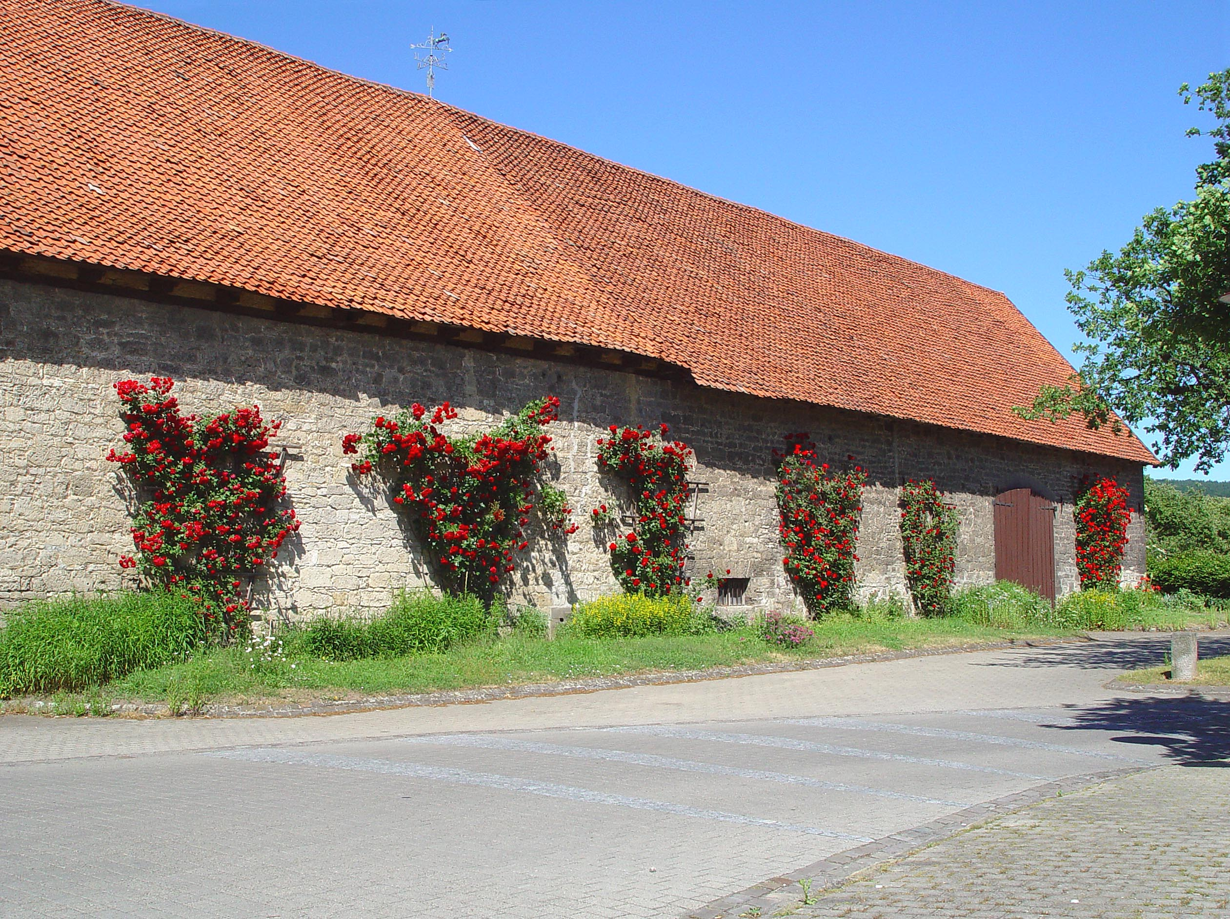 Beschreibung: Evessen, eine historische Gemeinde im Landkreis Wolfenbüttel (Deutschland) Aufnahmedatum: 18. Juni 2005 Fotograf: ArtMechanic